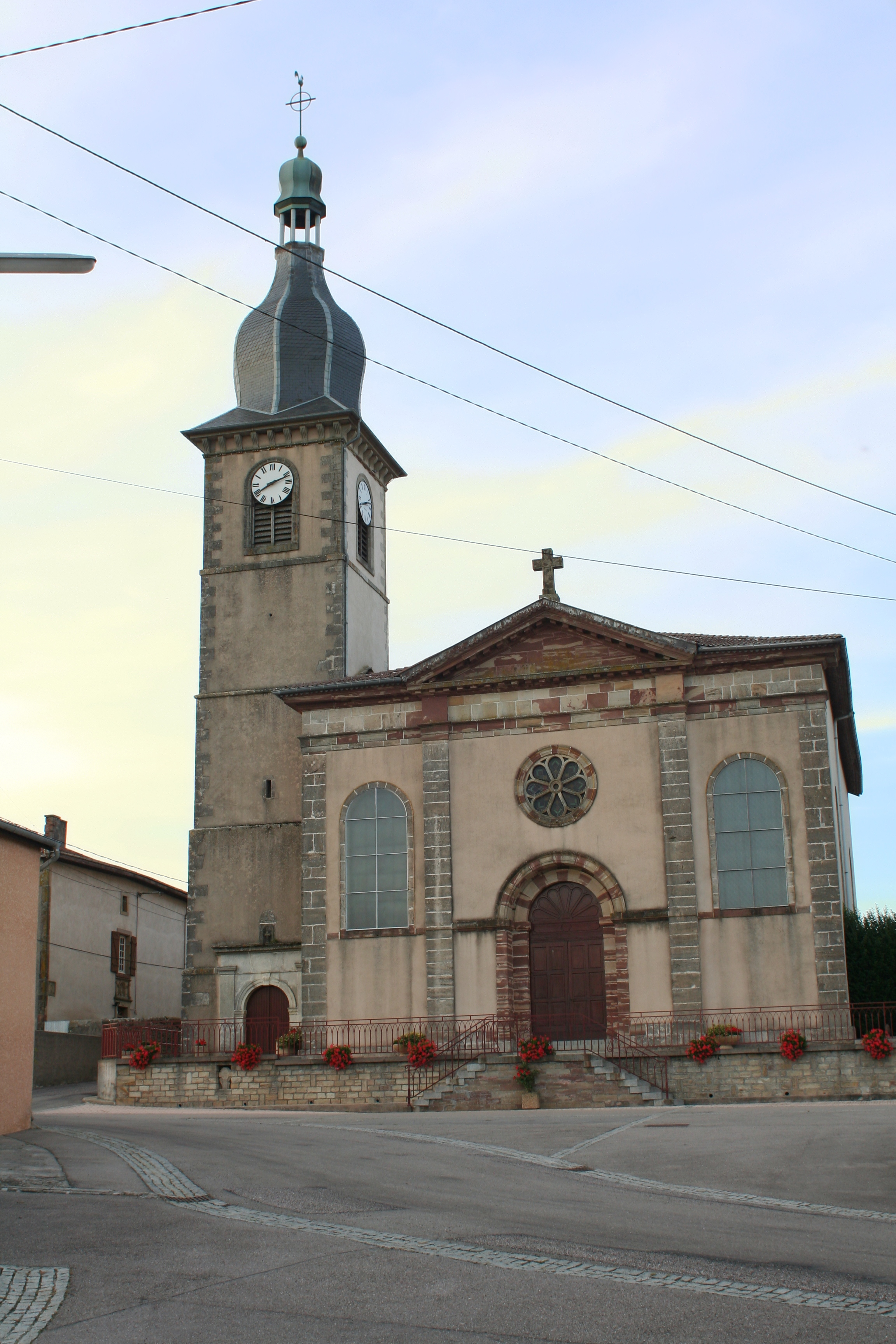 Façade occidentale de l'église Saints-Simon-et-Jude de Rehaincourt (Vosges)